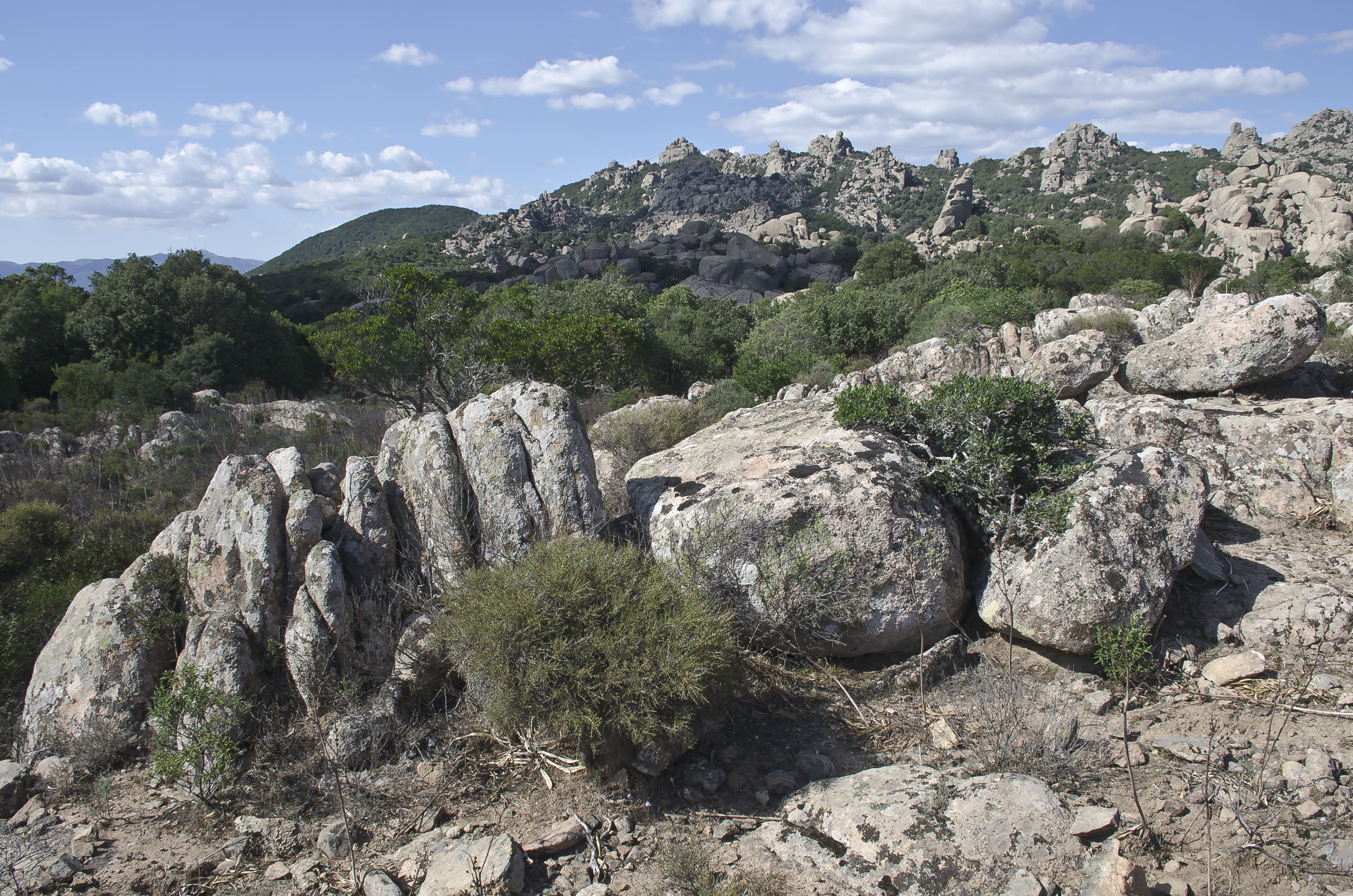 Le cime dei Sette Fratelli, Sardegna